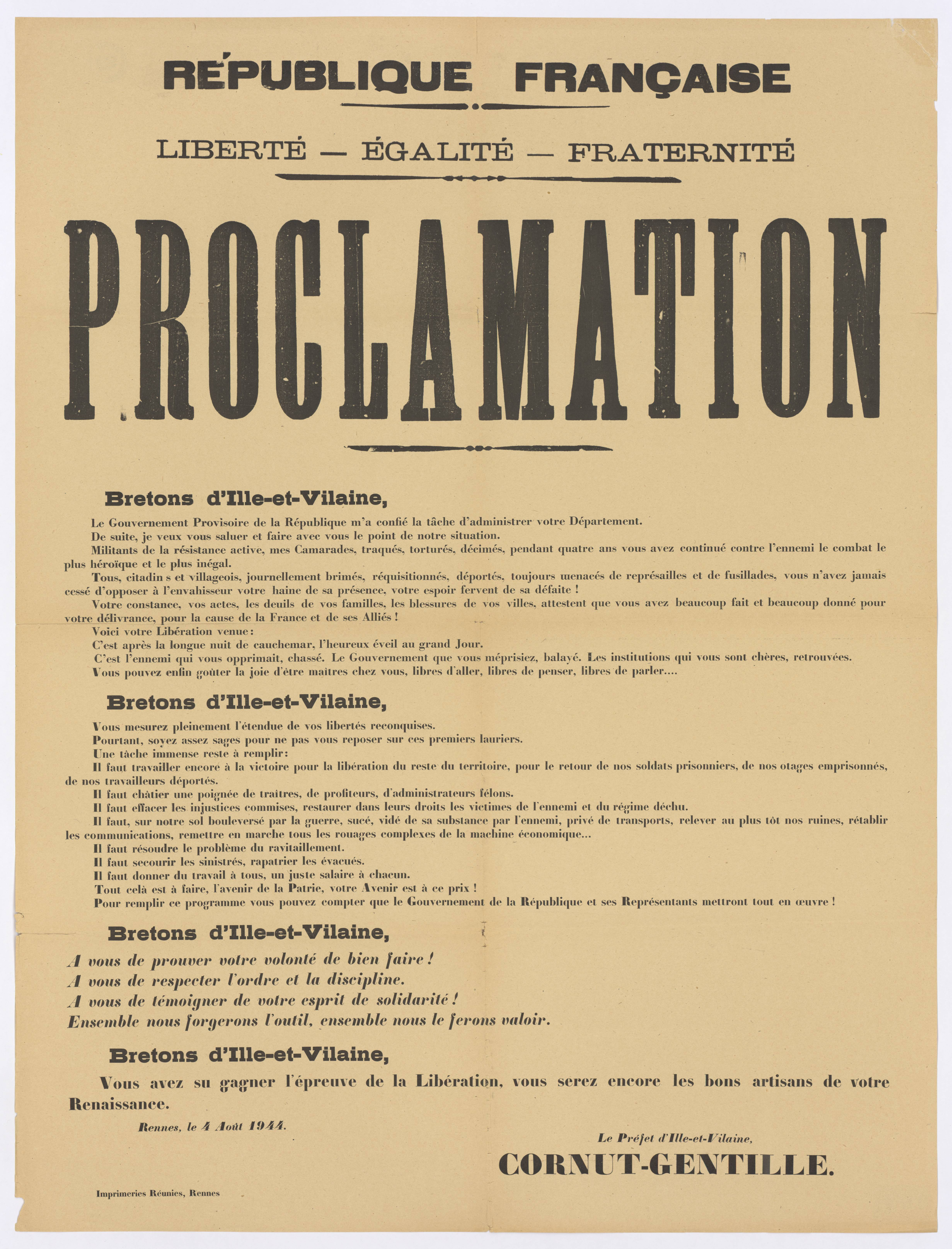 Texte prononcé par le nouveau préfet d'Ille-et-Vilaine Cornut-Gentille le 4 août 1944, jour de la Libération de Rennes. Affiche éditée par les Imprimeries réunies, Rennes. Archives municipales de Rennes, 9Fi5.